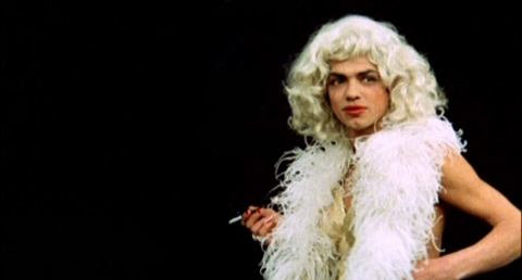 Képkocka a „Csúfak és gonoszak” című filmből